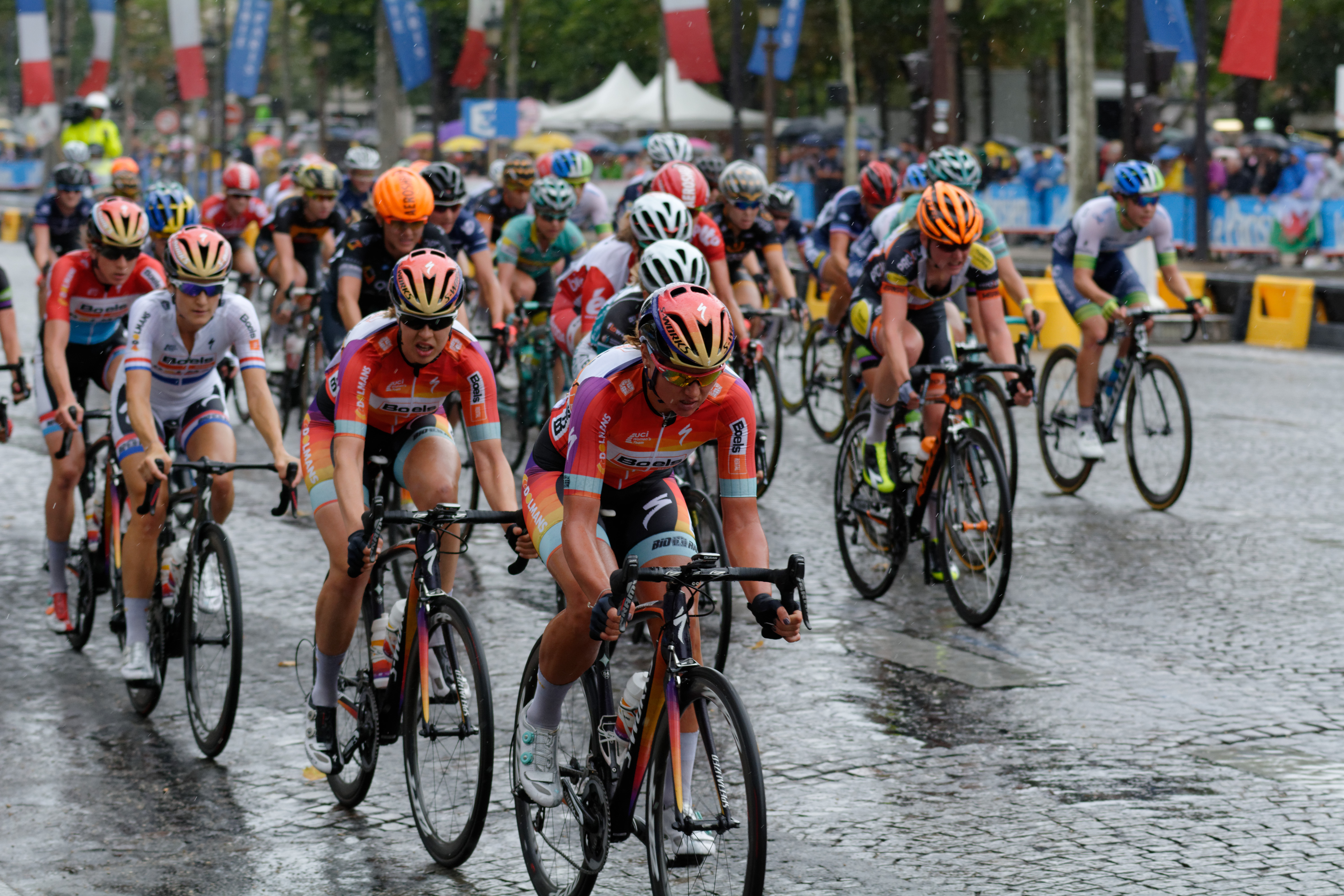 D71_1775_DxO